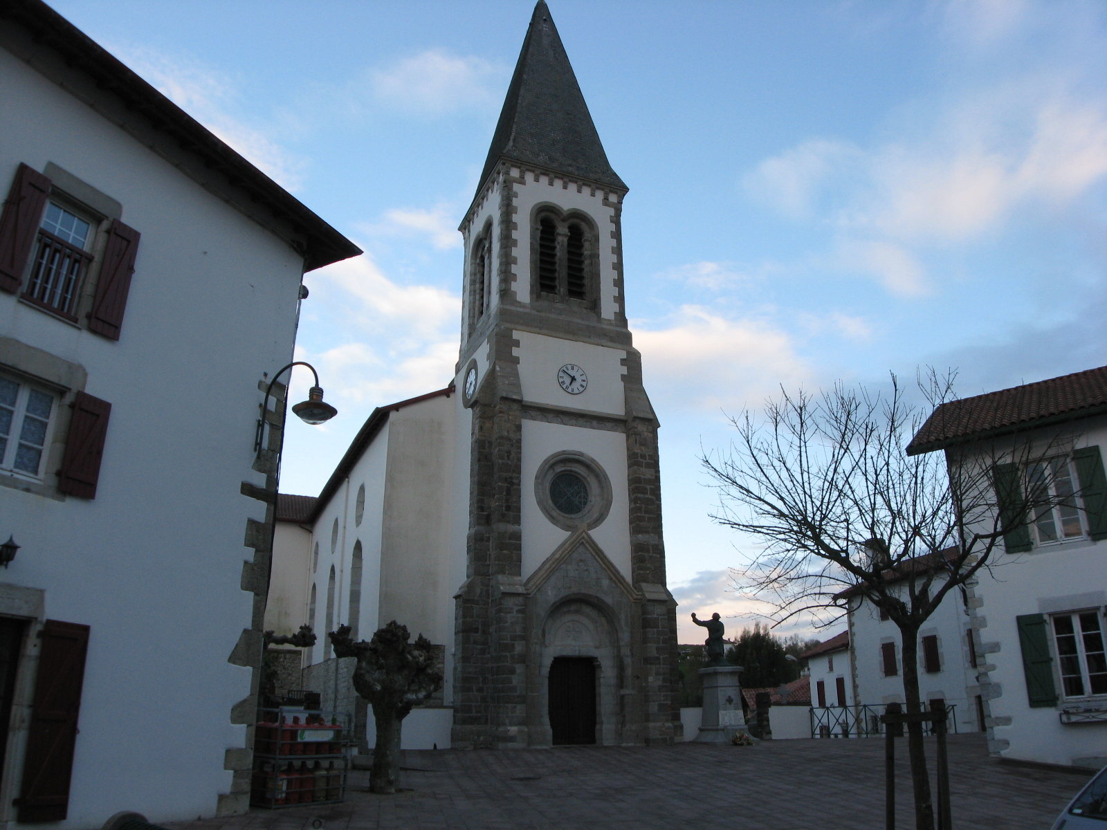 Eglise de Briscous (Pyrénées-Atlantiques) (Pyrénées).